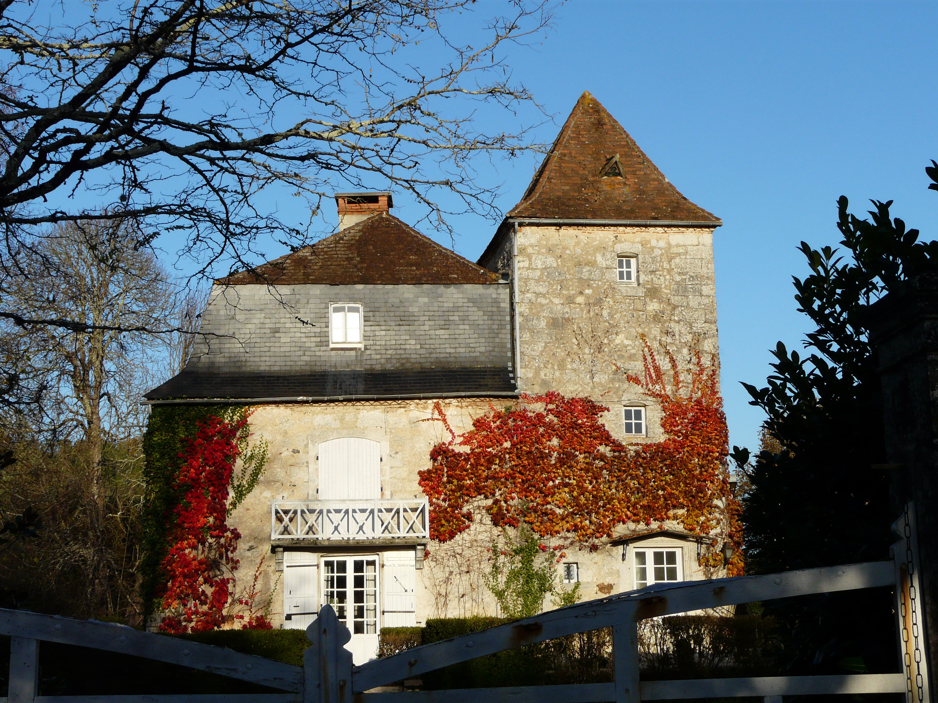 Manoir au nord de l'église de Saint-Crépin-d'Auberoche, Dordogne, France.